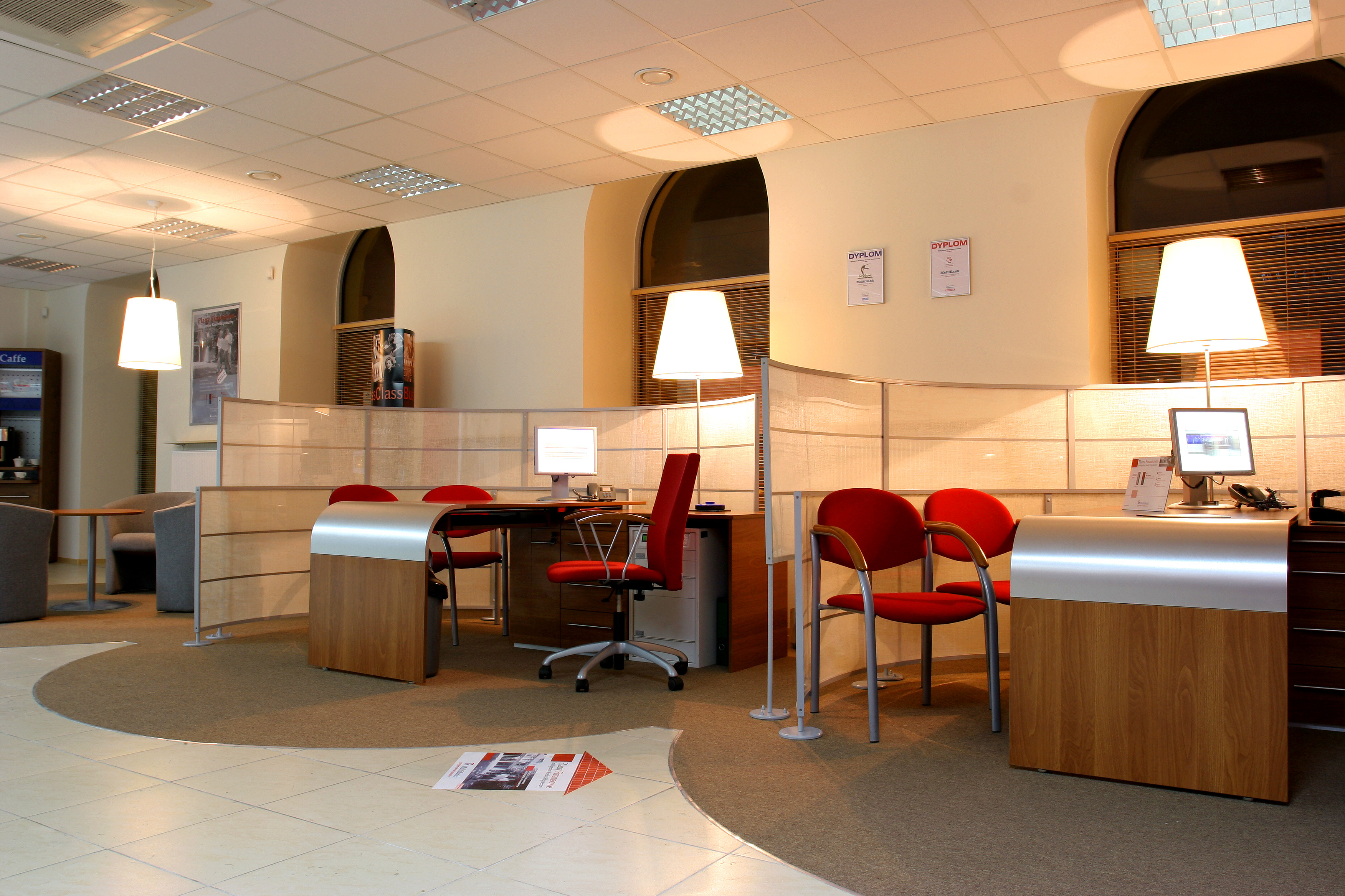 Wnętrze placówki MultiBanku